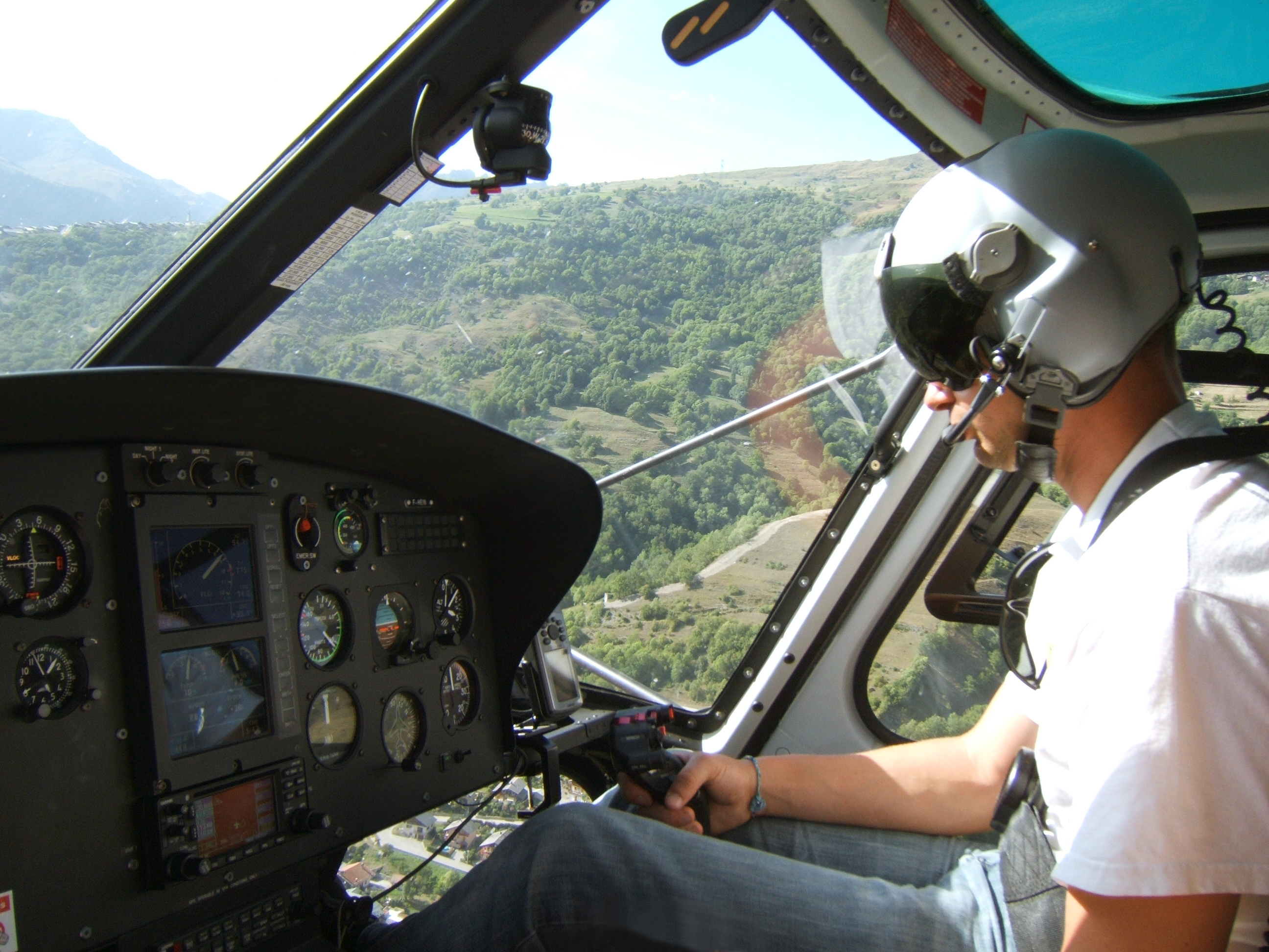 Pilote d'hélicoptère AS-350 Écureuil au-dessus de la vallée de la Tarentaise.